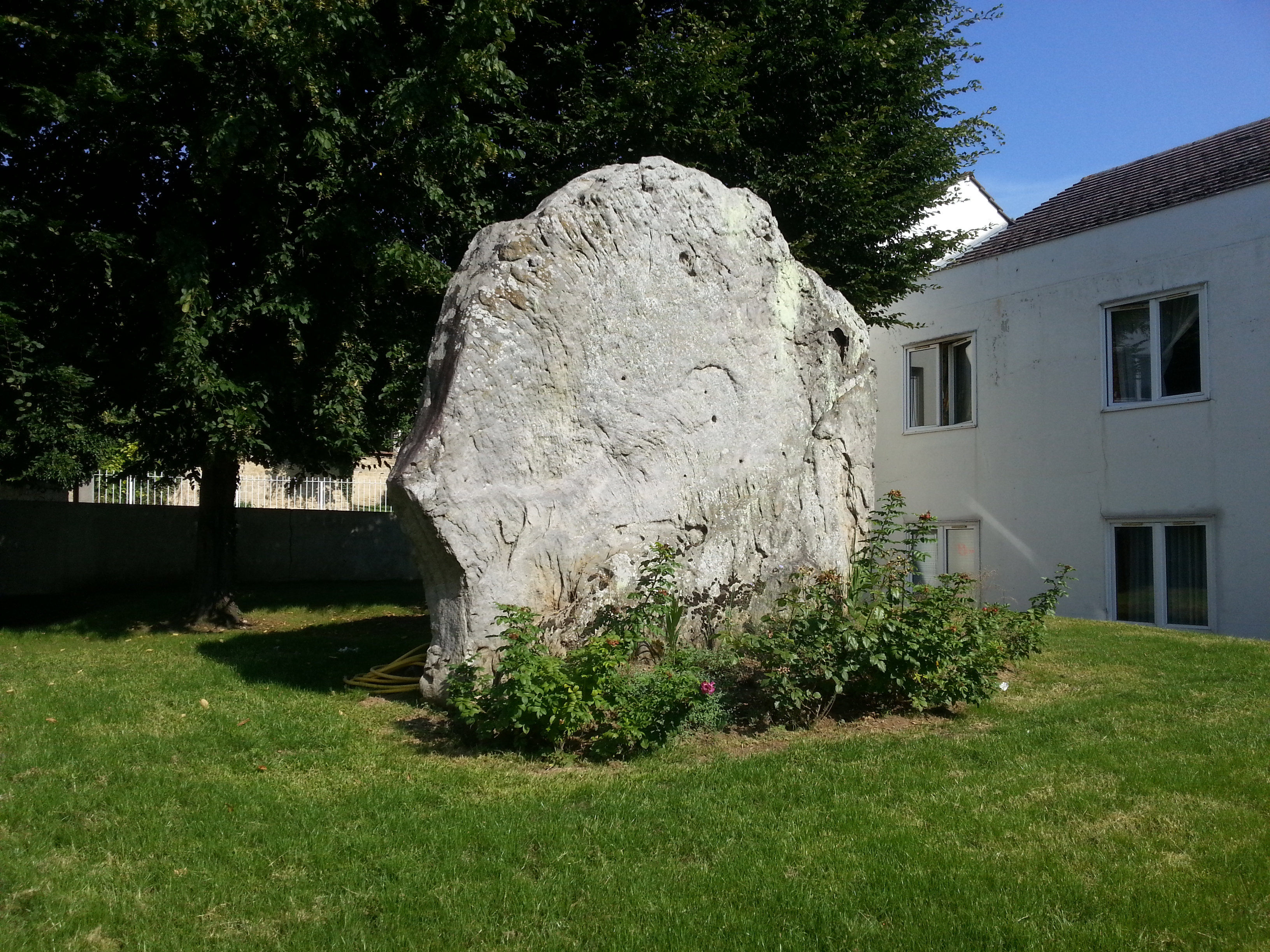 Le menhir dit la Pierre-Fouret, menhir de Gency, ou encore le palet de Gargantua (classé monument historique par liste de 1889), au hameau de Gency, rue de Vauréal, dans le jardin de la maison de retraite.